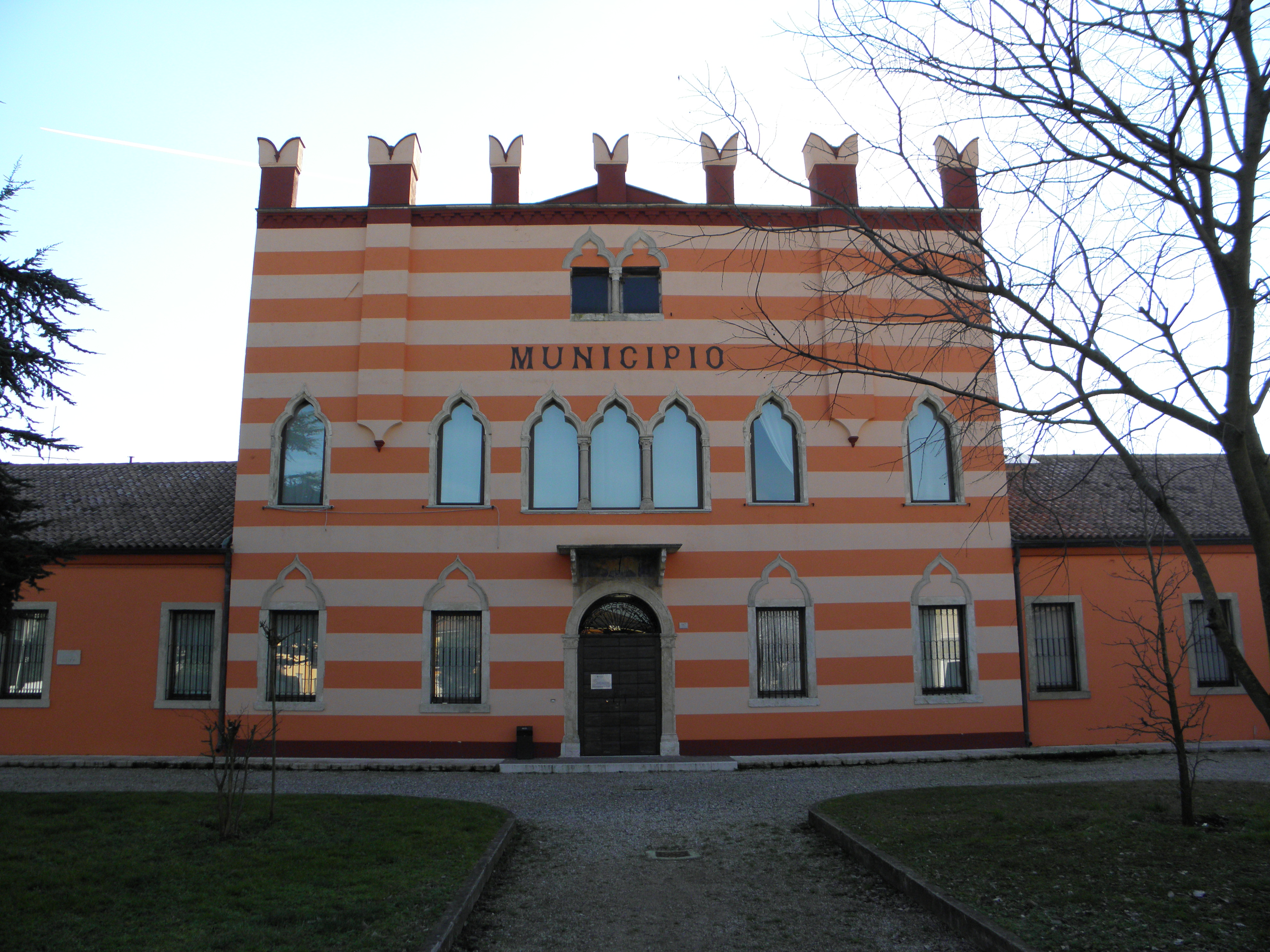 Isola Rizza, provincia di Verona: Villa Pollettini, sede municipale di Isola Rizza (XV secolo)